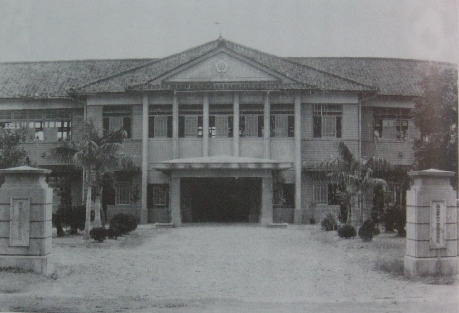 臺灣省立臺中工業職業學校1945年時的景象